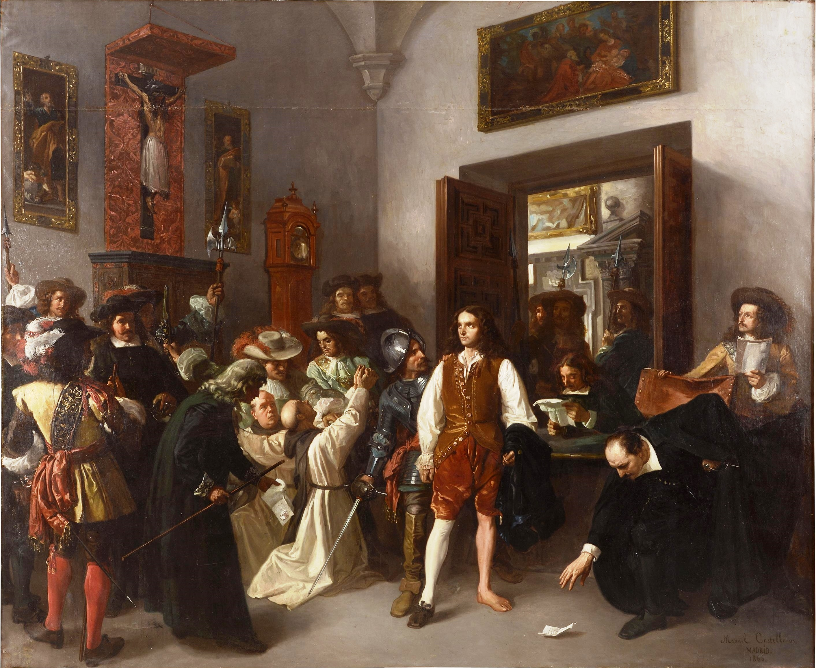 La obra representa el momento en que se ordenó el arresto de Fernando de Valenzuela (1636-1692), primer marqués de Villasierra y confidente de la reina Mariana de Austria, que en 1677 fue detenido por orden de Juan José de Austria en el monasterio del Escorial y condenado a 10 años de destierro en las Islas Filipinas, aunque falleció en México, en 1692.